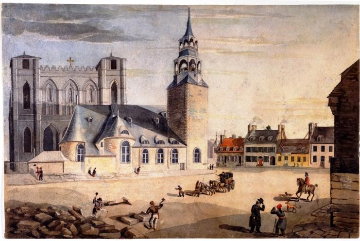 The Place d'Armes, Montreal, QC, 1828label QS:Len,"The Place d'Armes, Montreal, QC, 1828"label QS:Lfr,"La place d'Armes, Montréal, Qc, 1828"